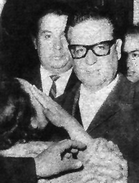 Salvador Allende Gossens